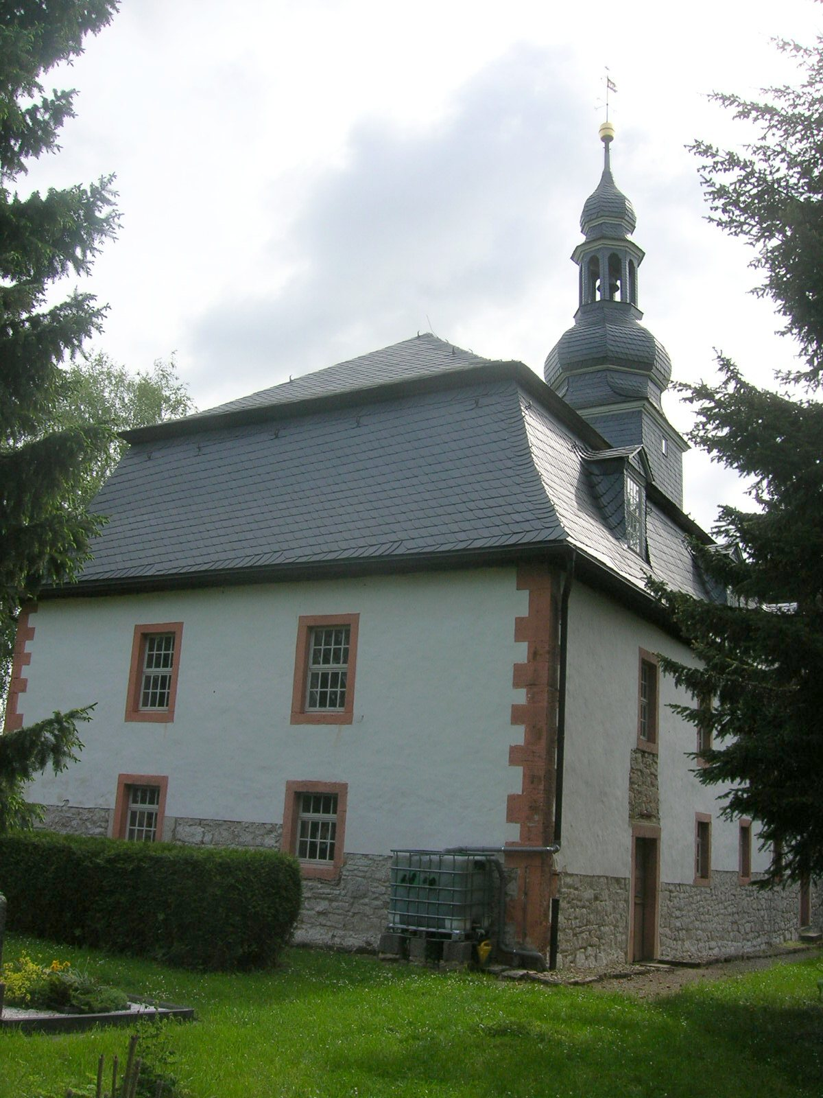 Dorfkirche St. Bonifacii in Dannheim im Ilm-Kreis